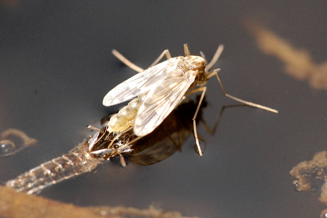 Guttipelopia guttipennis from Commanster, Belgian High Ardennes .